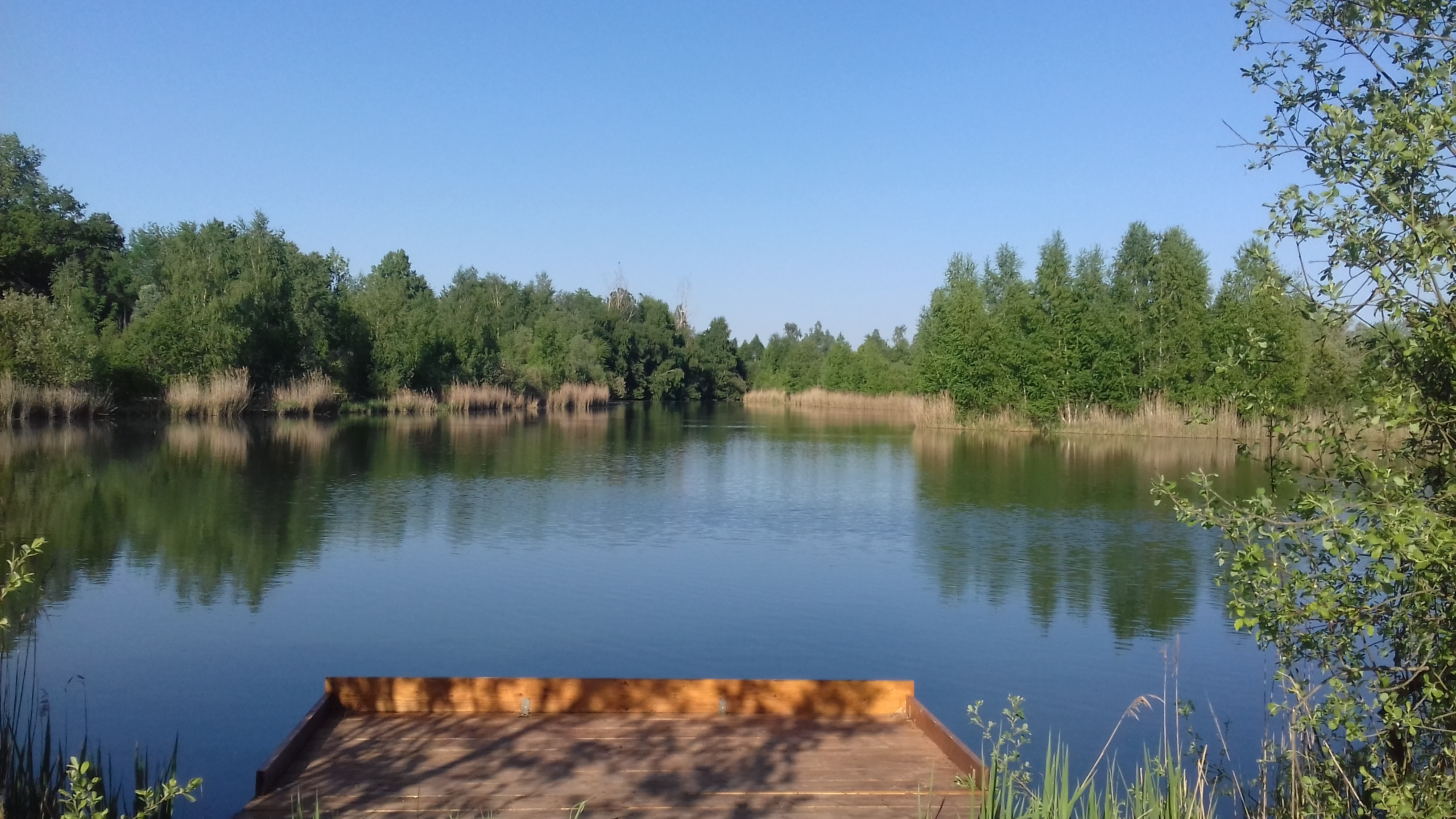 L'étang du village qui est fréquenté par les pêcheurs. Un cadre très agréable.